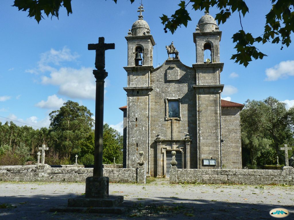 Pontevedra-Iglesia de Salcedo02